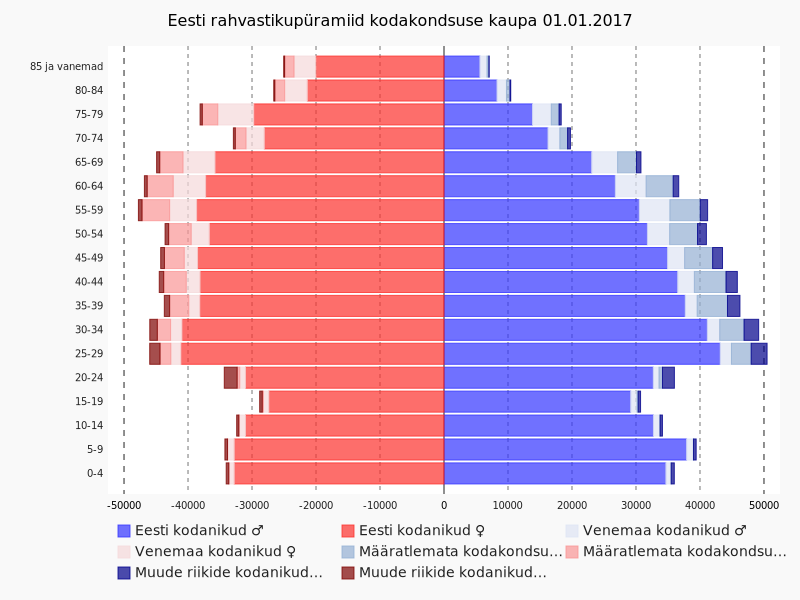 Eesti rahvastikupüramiid kodakondsuse kaupa 2017